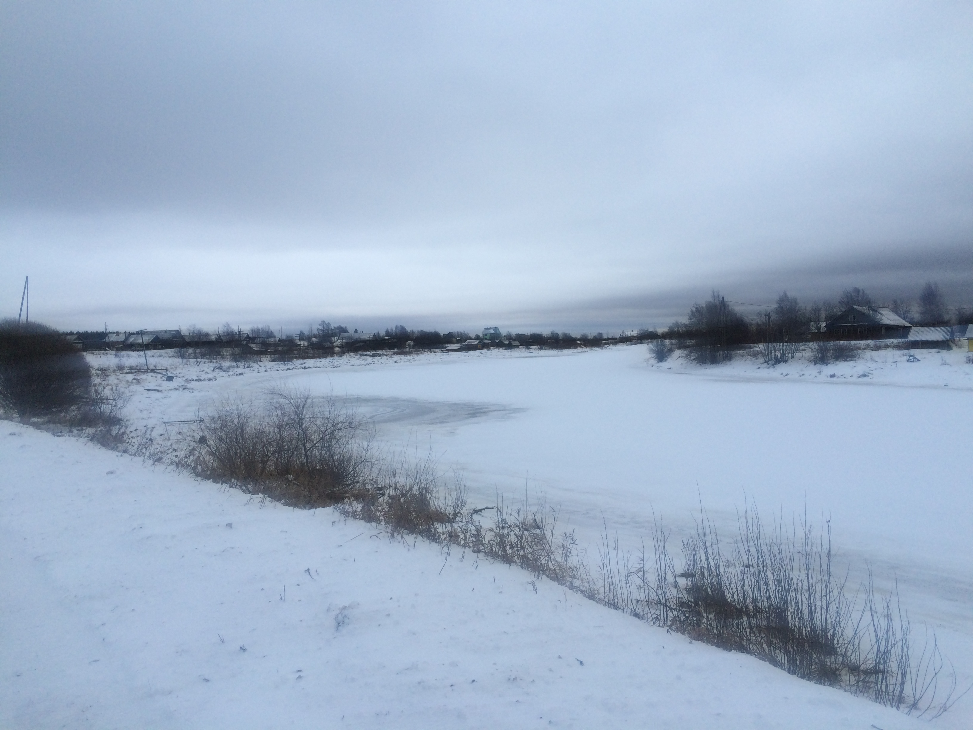 Река.Олонка в пос. Большаково.